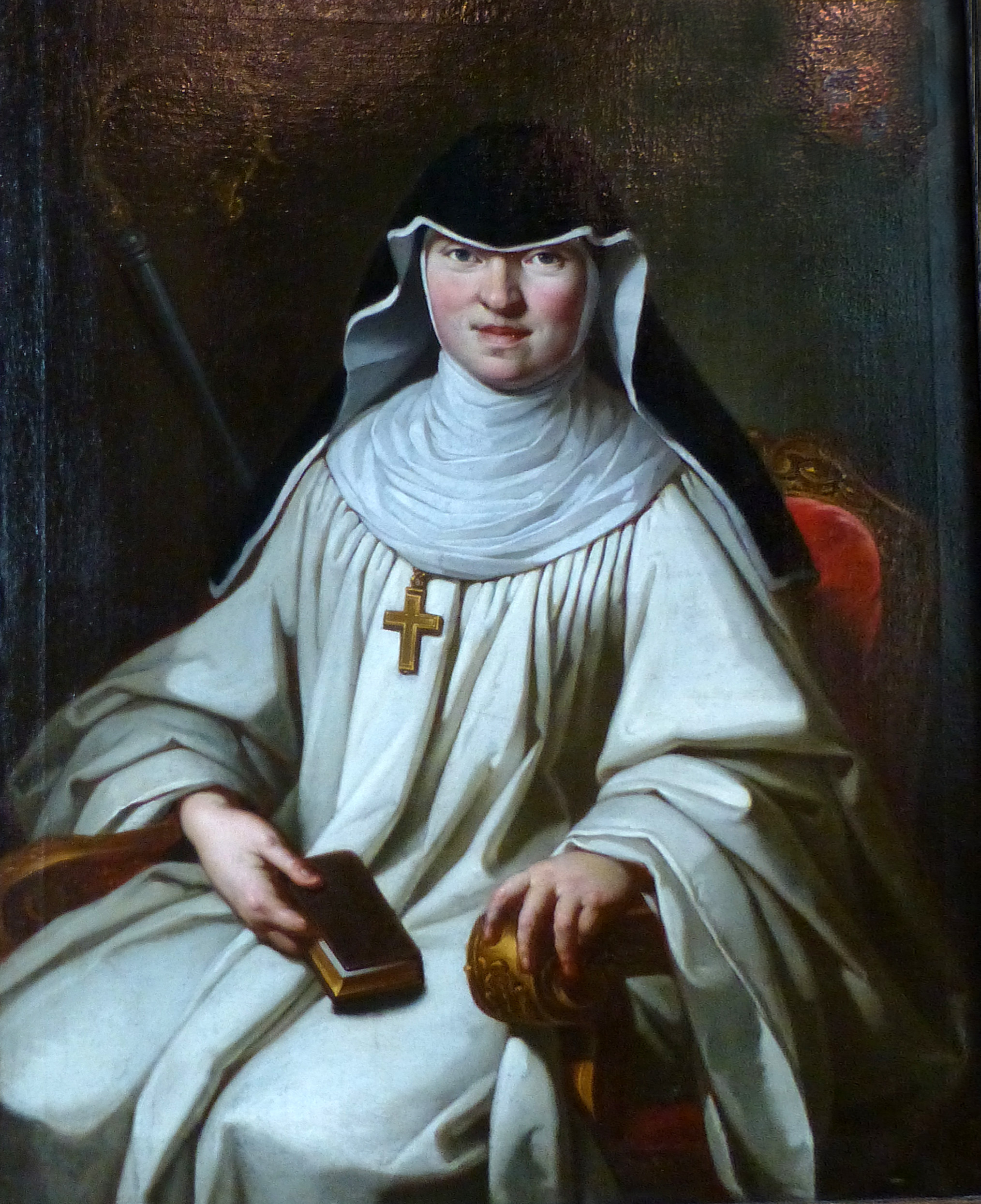 Portrait de Soeur Marie Edmonde, 1772 (Joséphine de Peyerimhoff), dernière abbesse de l'abbaye de Koenigsbrück, détruite en 1792.